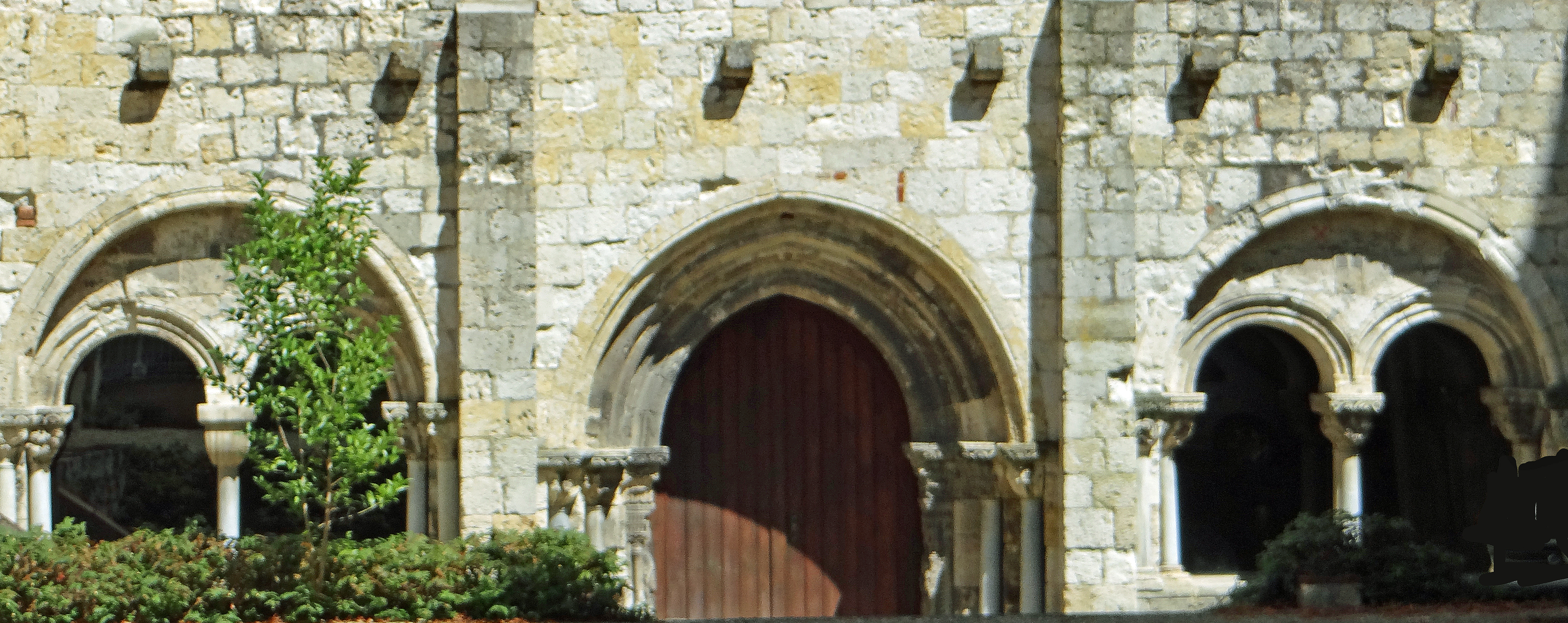 Agen - Chapelle du lycée Saint-Caprais, ancienne salle capitulaire de la cathédrale.